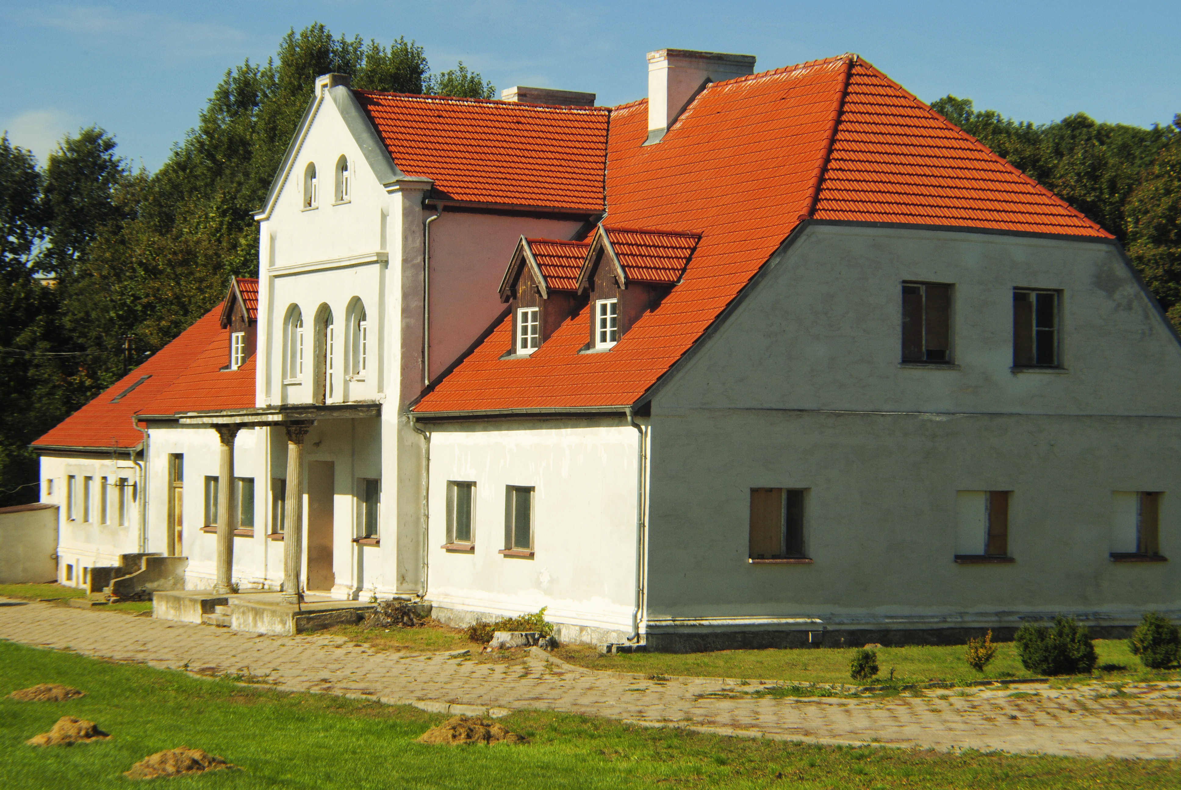 Rybno - dwór z 1. połowy XIX w. (zabytek nr 2087/A)